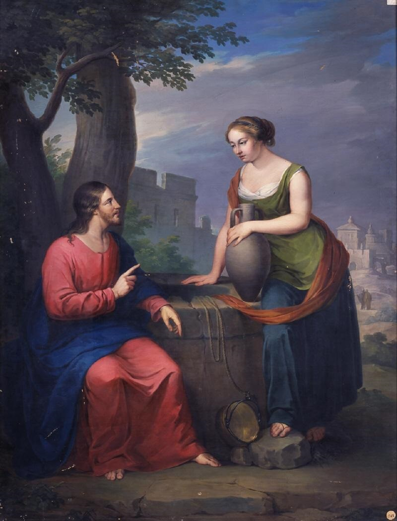 La obra representa a Jesucristo conversando con la mujer samaritana junto al pozo.